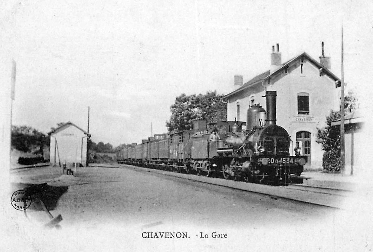 La gare de Chavenon avant ou vers 1900 avec un train du PO.